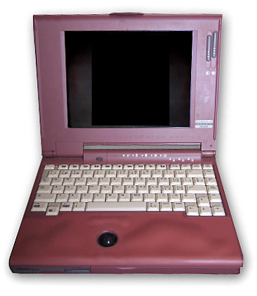 Bildbeschreibung: Bild des Echos 44 Color von Olivetti Quelle: Fotograf/Zeichner: Cmon Datum: 27.6.2006